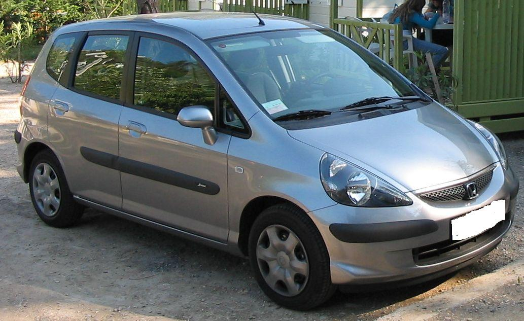 Honda Jazz